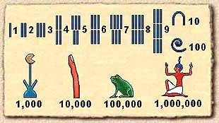 Egipatski brojevi